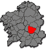 Mapa coa localización da Comarca da Terra de Lemos.